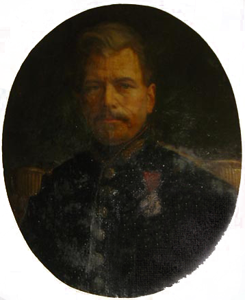 Portrait du Colonel Viénot